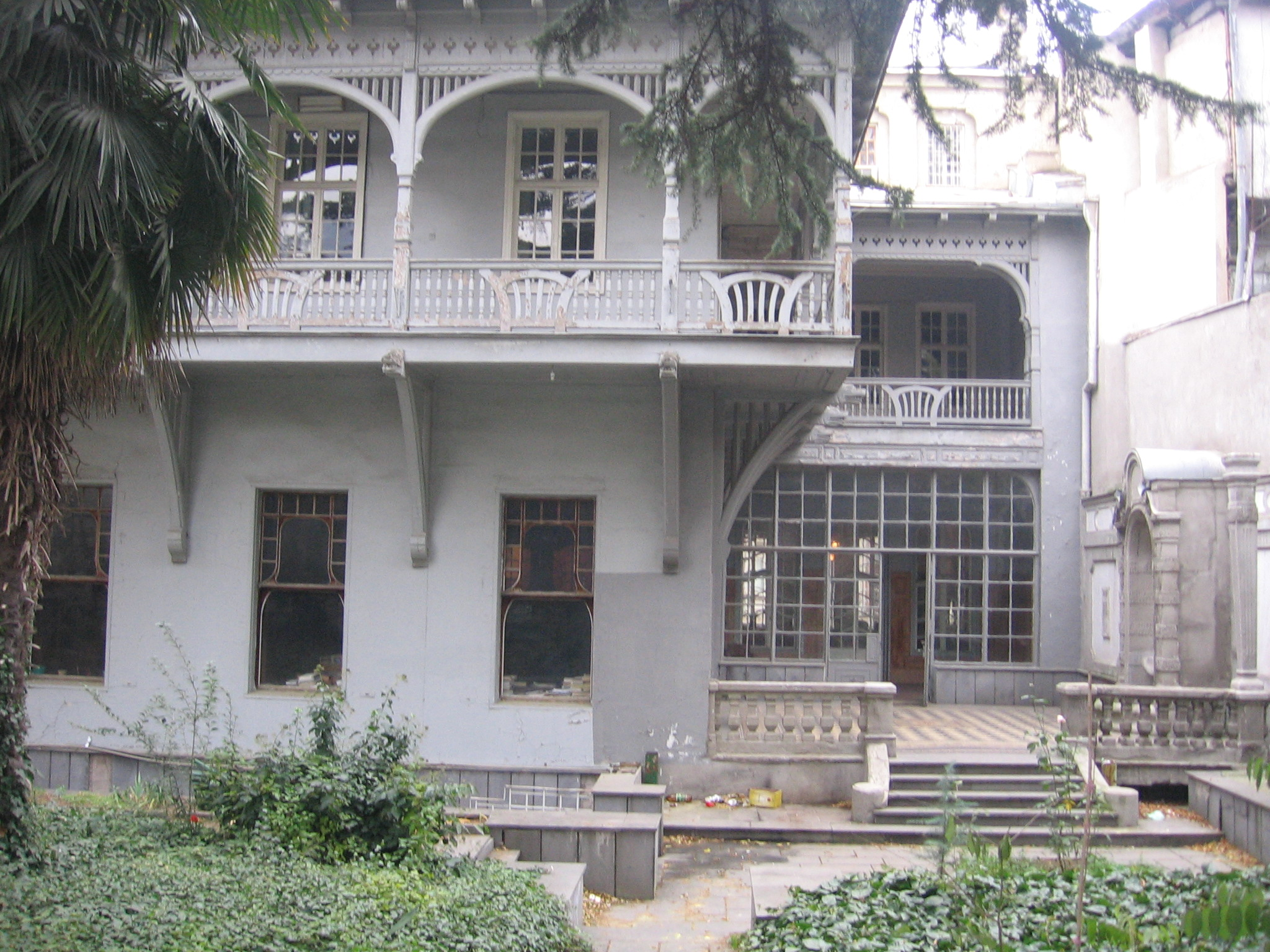 Behausung des Georgischen Schriftstellerverbands - Дом писателей в Тбилиси - Tbilisi, House of the Writers